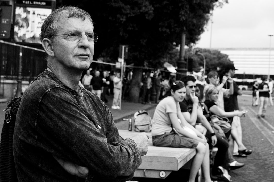 Aldo Busi a Roma